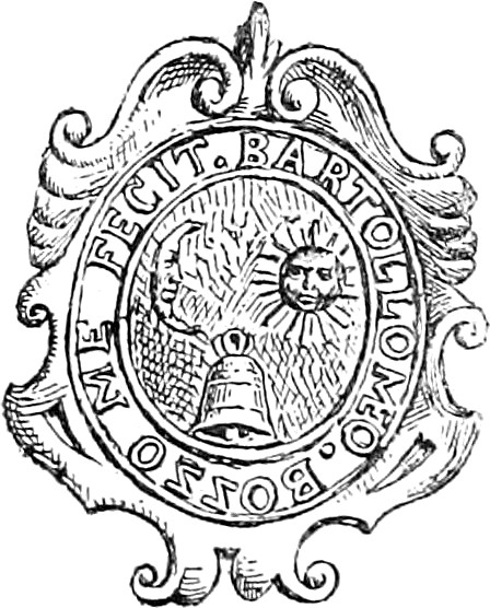 Marca del fonditore Bartolomeo Bozzo, 1742-1744